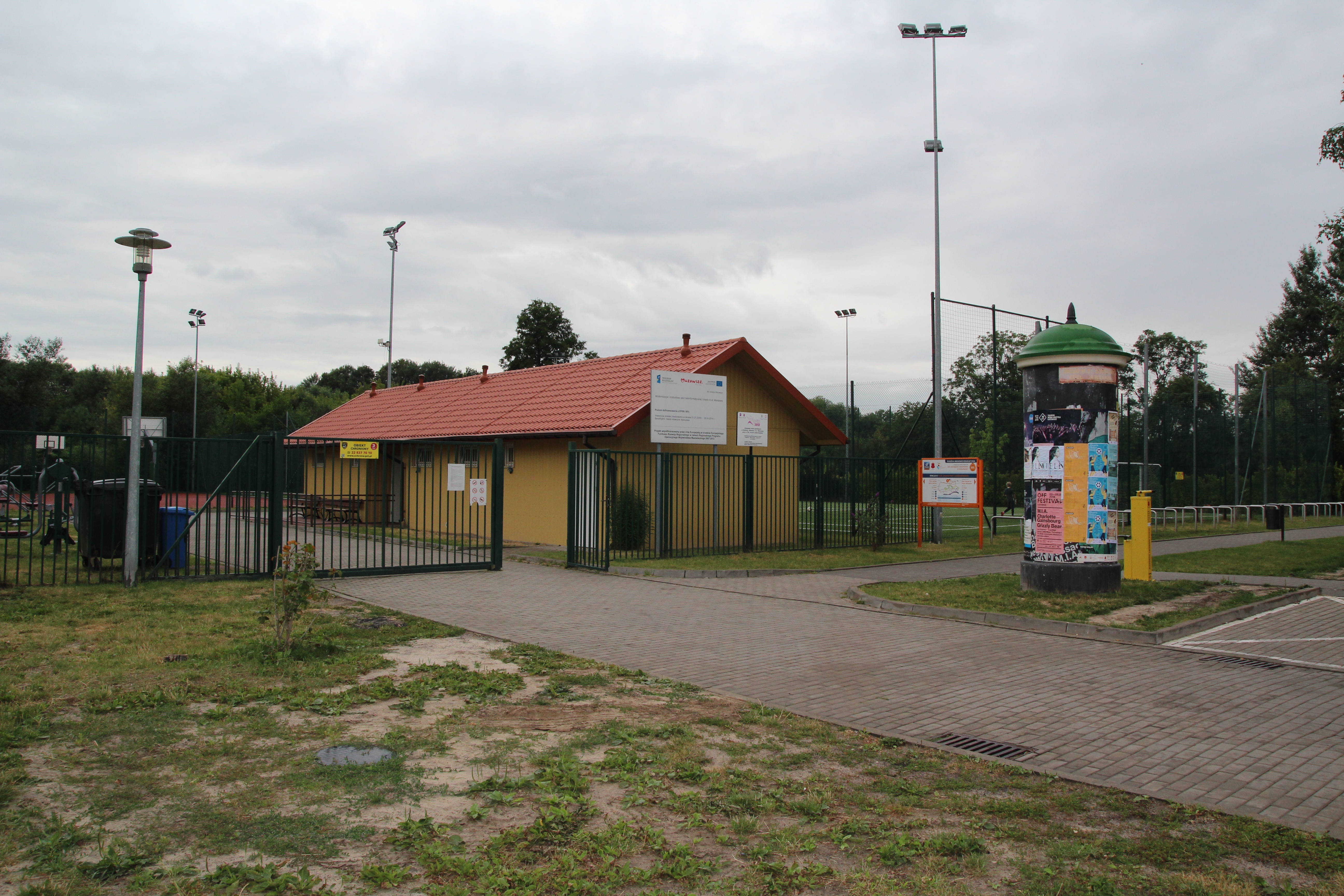 sports venues, Worobczuka